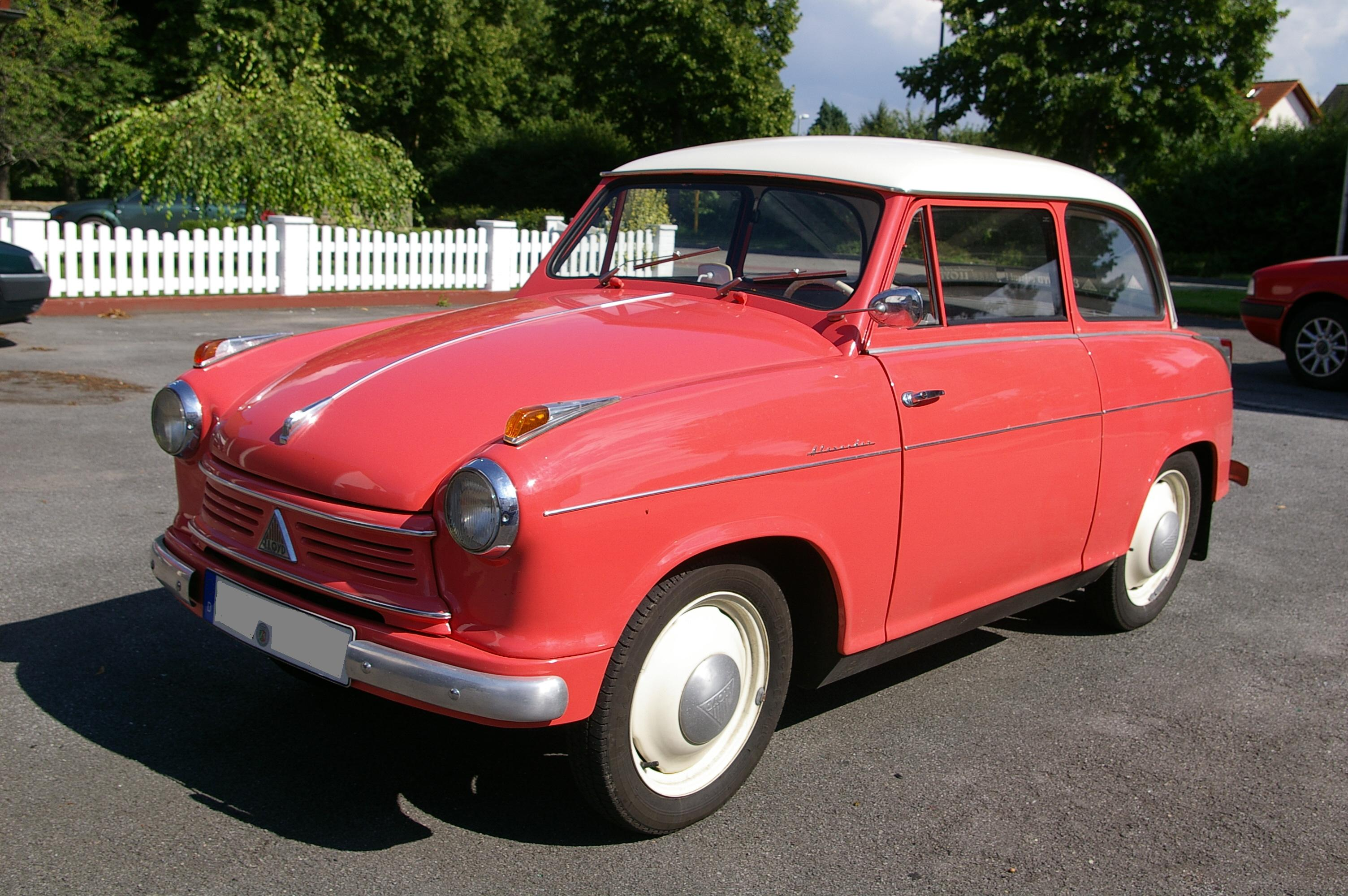 Hansa-Lloyd 600